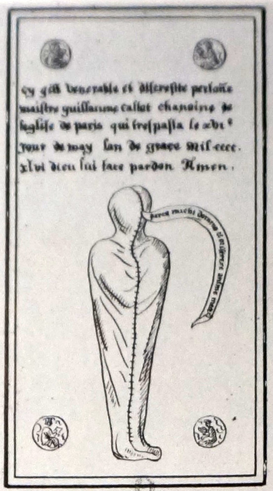 relevé fait pour Gaignières se trouvant à la BNF.